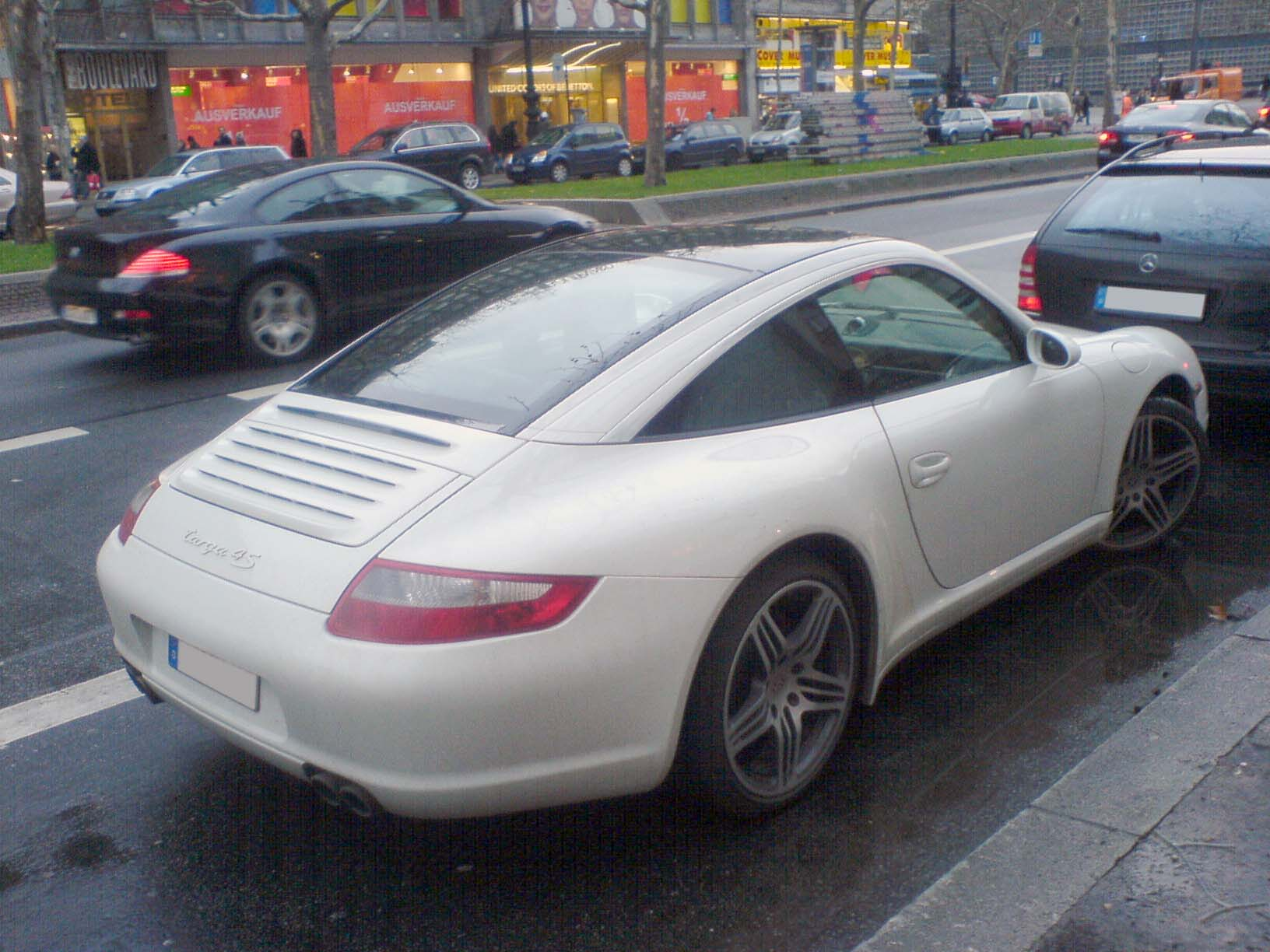 Porsche 911 Targa 4S (997)